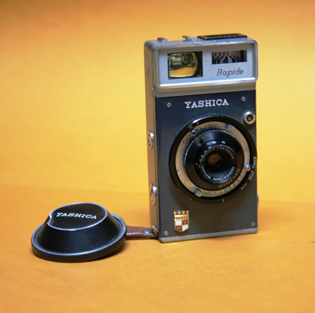 Coll. Marcè CL - Yashica Rapid 1961, copal-SV Yashinon[1]